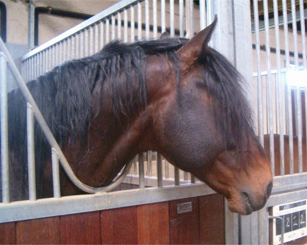 Cheval de race lusitanien.